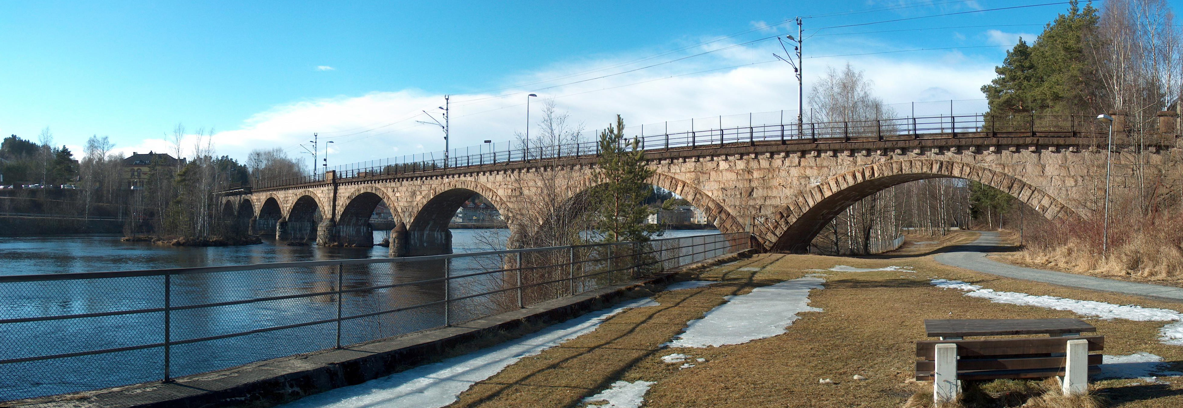 Begna bru over Ådalselva i Hønefoss (Begna Bridge past river Begna in Hønefoss, Norway)